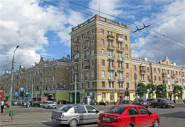 Угол улиц Декабристов и Гагарина, Казань